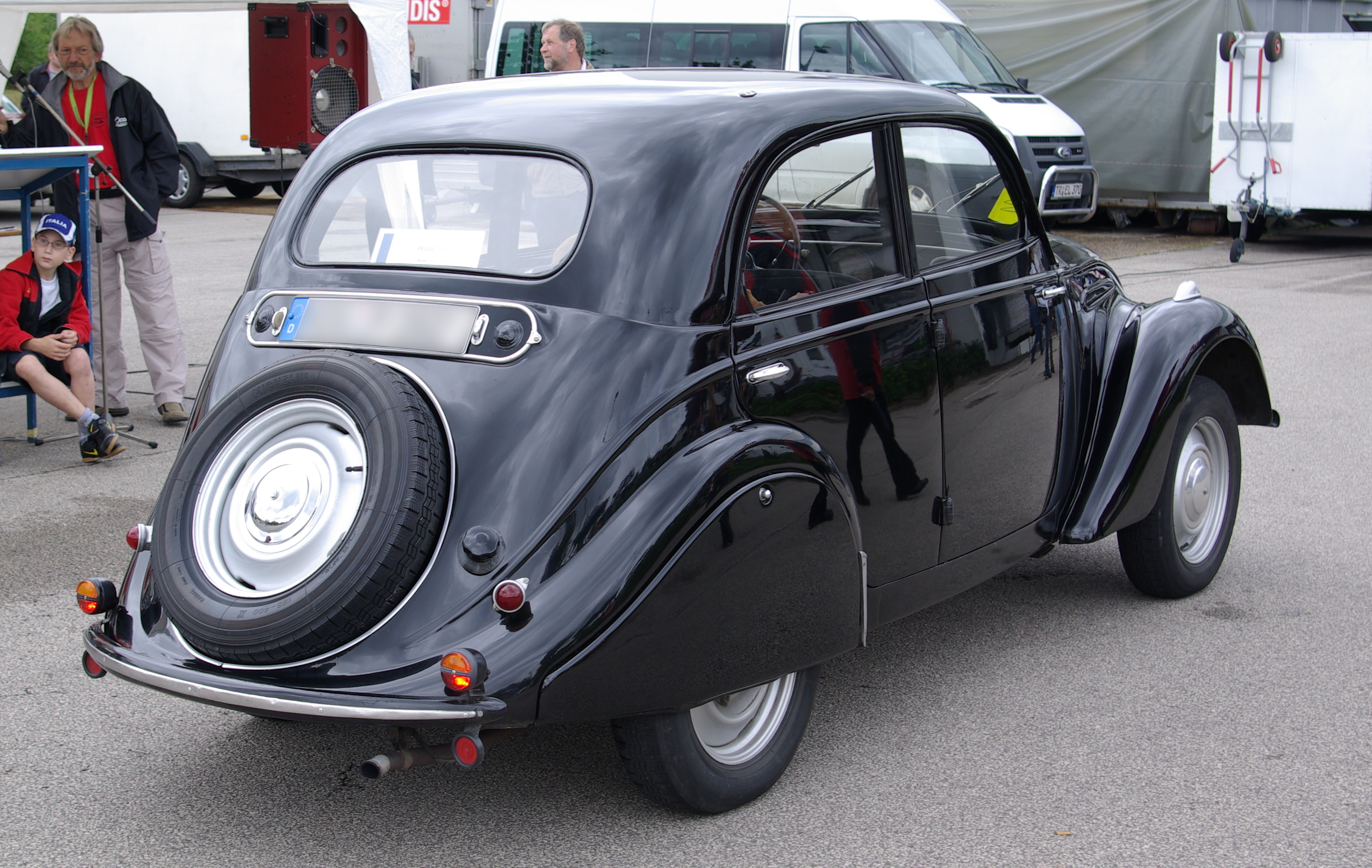 Peugeot 202, Baujahr ca. 1938